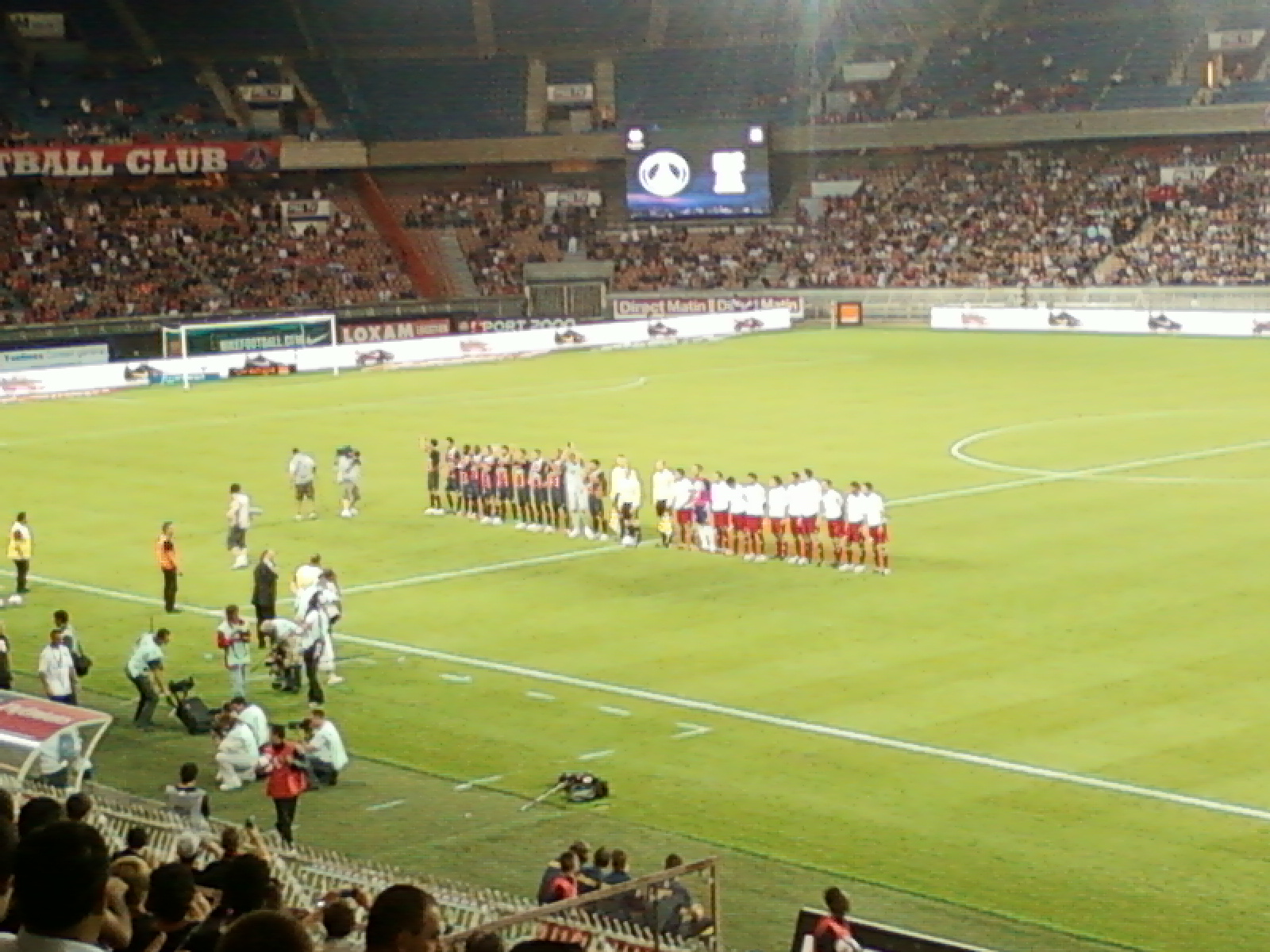 Présentation des équipes lors du match Paris SG - Differdange du 25 août 2011 au Parc des Princes